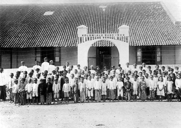 Repronegatief. School van de Suiker Onderneming Maron, Oost-Java